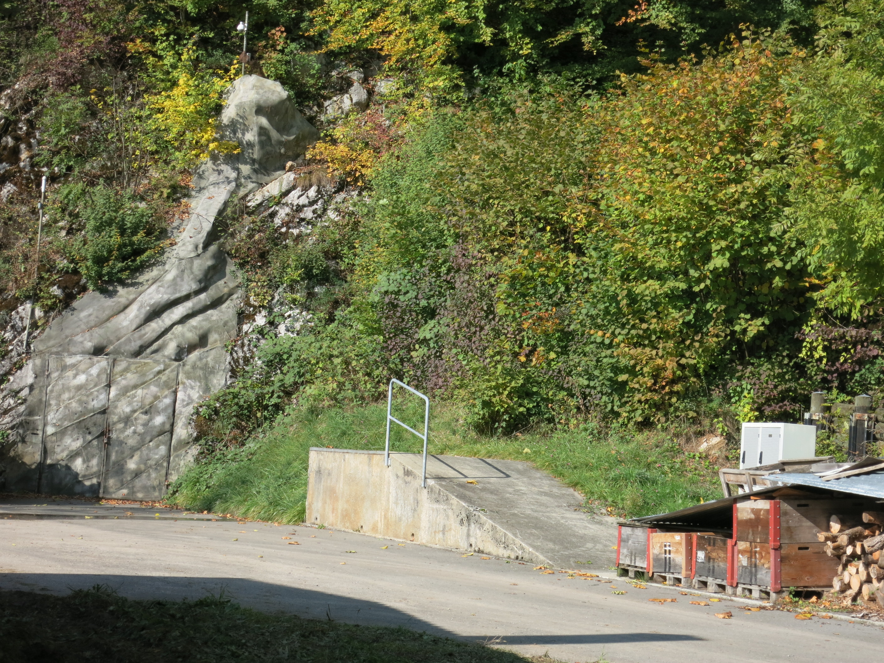 Artilleriewerk Champillon, Corbeyrier VD, Schweiz